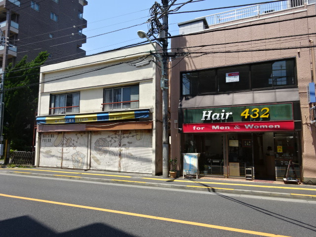 入口に戻って左から閉店中のパン屋さんと、古げな看板の床屋さん（当時物かしら？）。